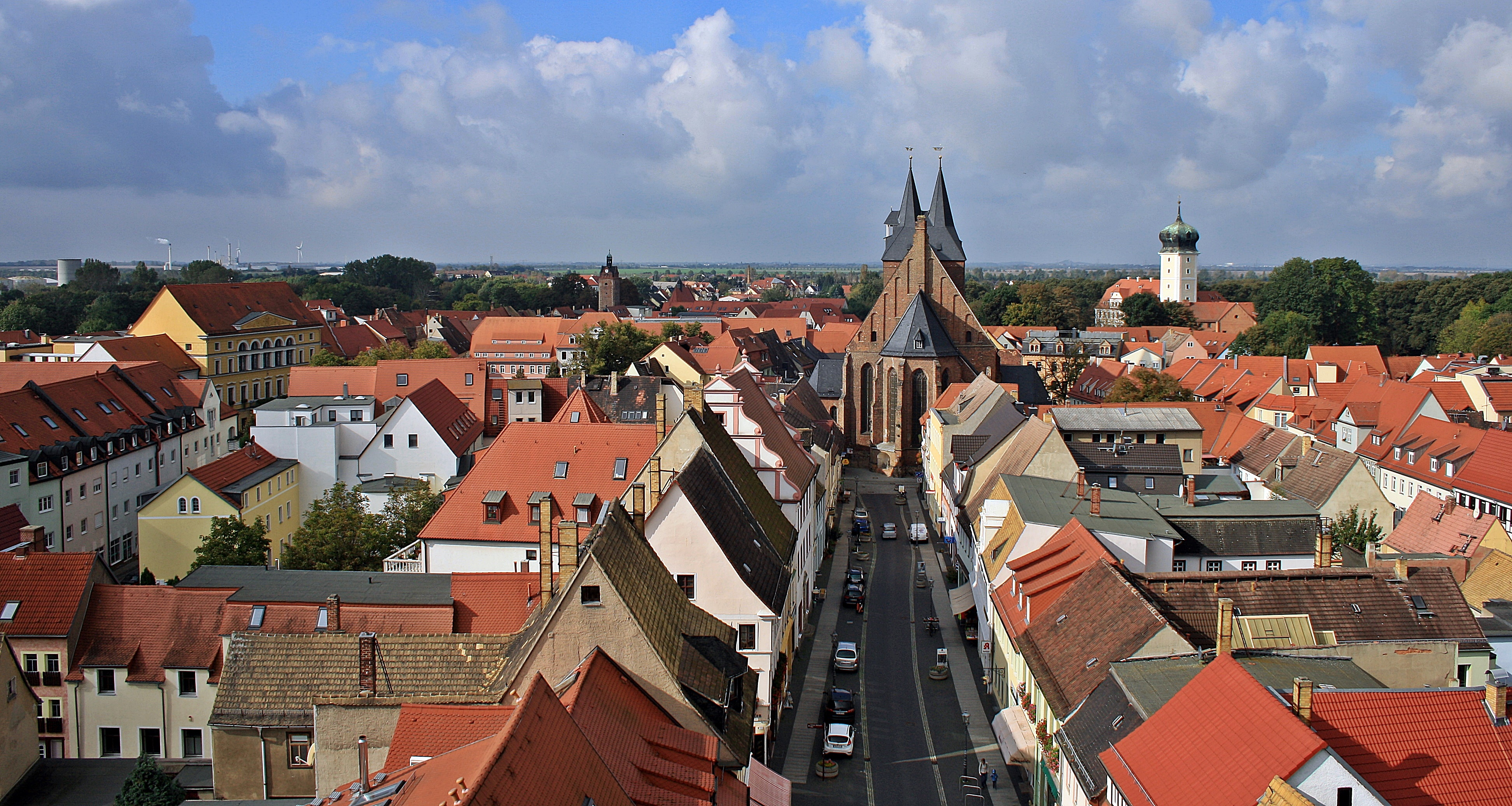 Östliche Altstadtansicht von Delitzsch